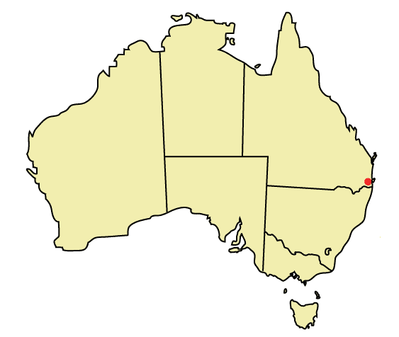 Locatie van Gold Coast in Australië